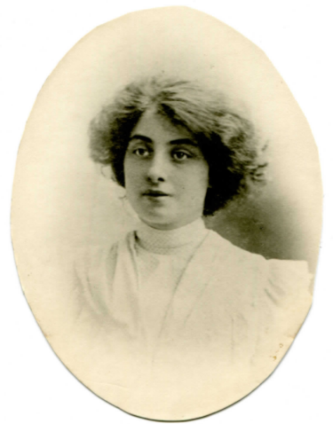 ritratto di Rina Melli